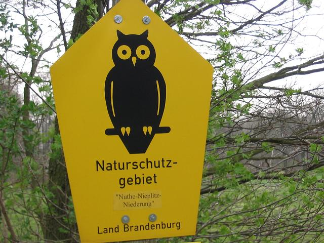 Schild Eule